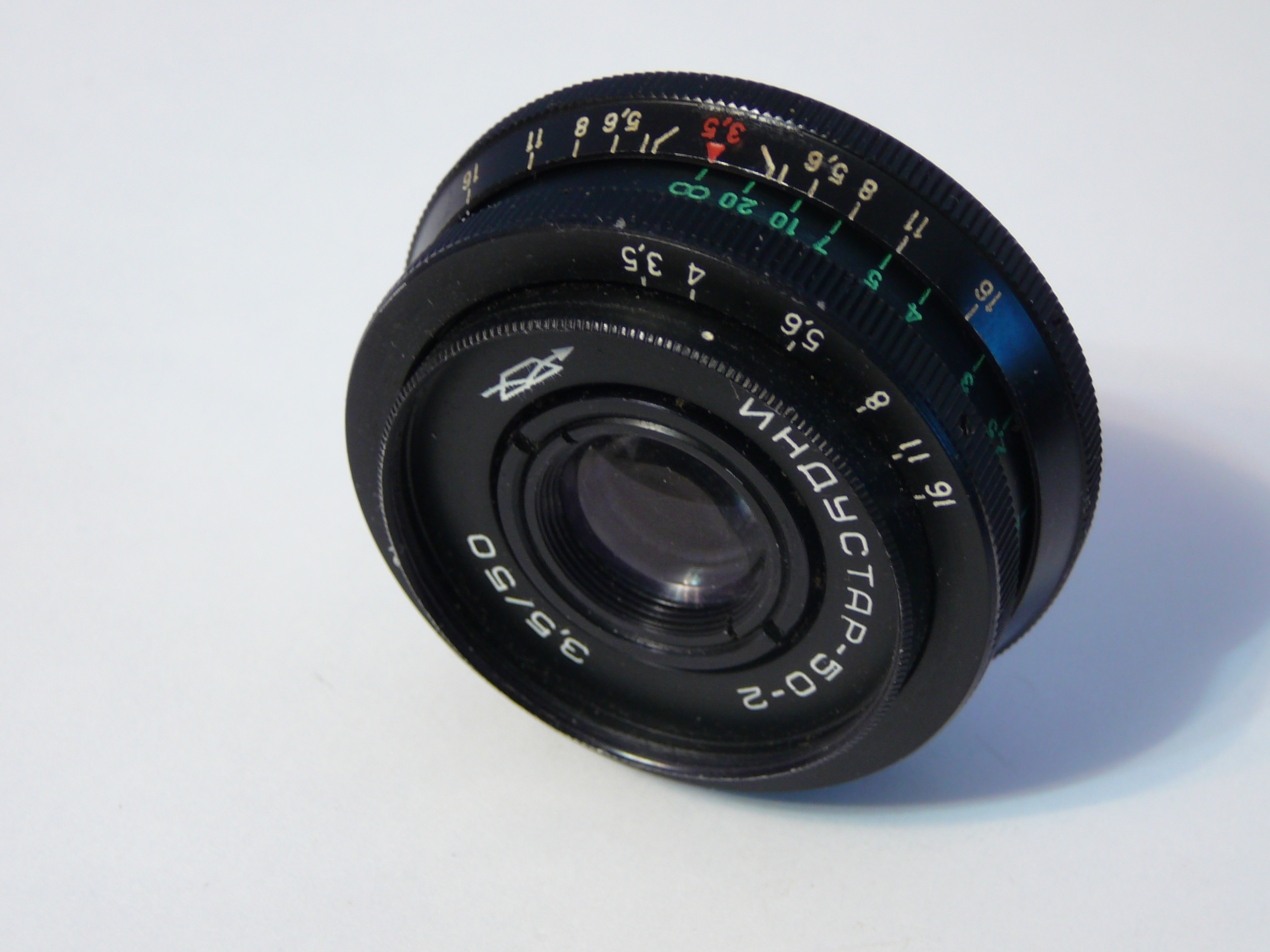 Объектив «Индустар-50-2»